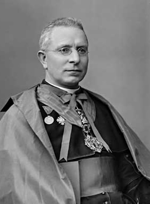 František Zapletal (1861 - 1935), Český katolický duchovní.